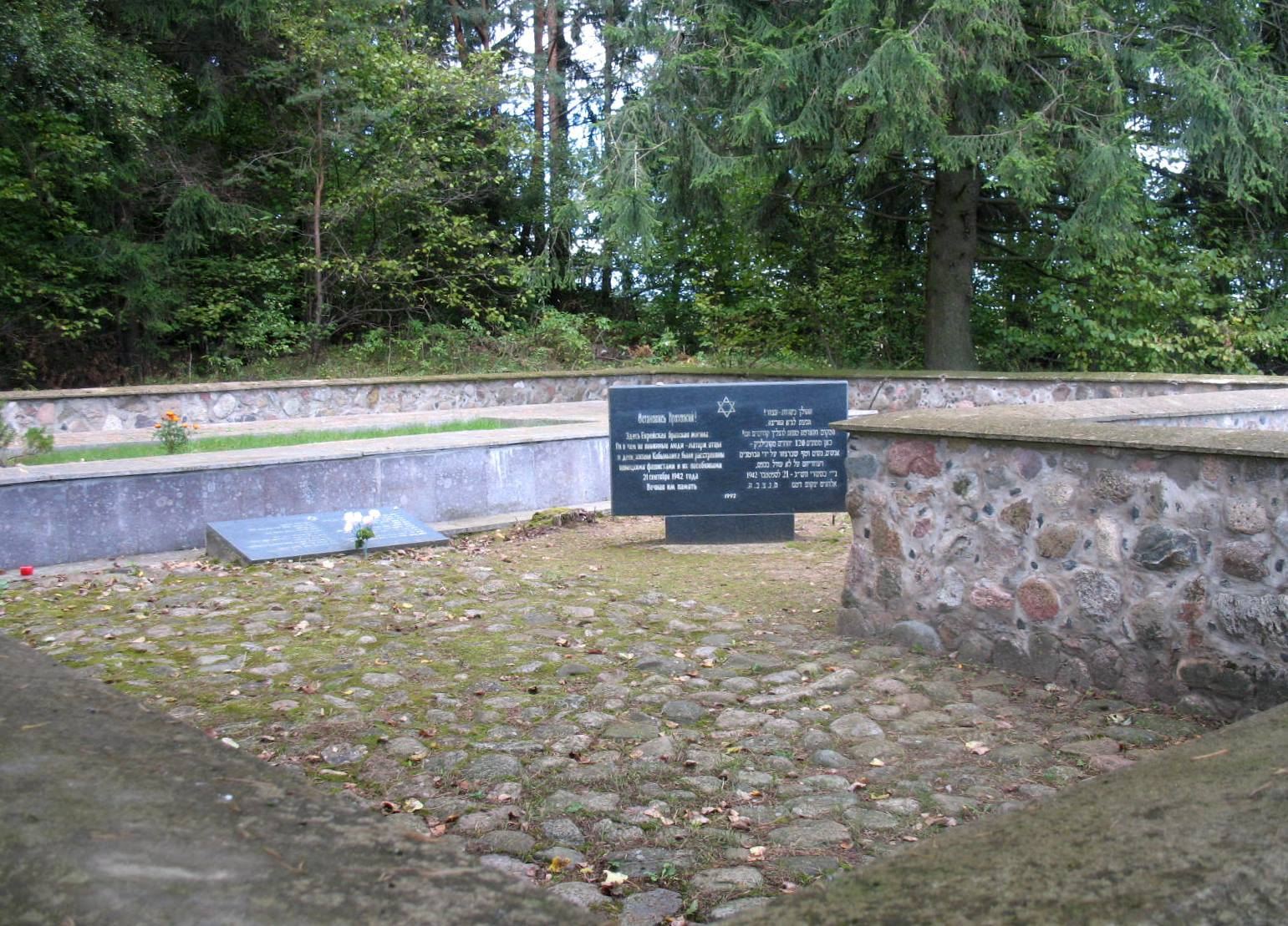 Мемориал на братской могиле в память 120 евреев Кобыльников (Нарочь), убитых на этом месте 21 сентября 1942 года. Находится по дороге на Вильнюс у католического кладбища. Установлен в 1992-1994 годах евреями из Израиля, выходцами из Кобыльников, под руководством Меера Свирского.